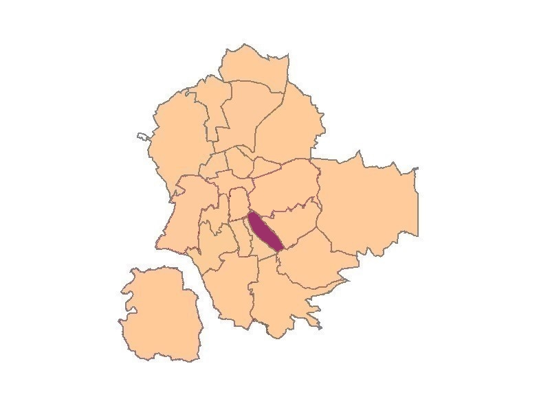 plan de saint-etienne quartier du Fauriel.